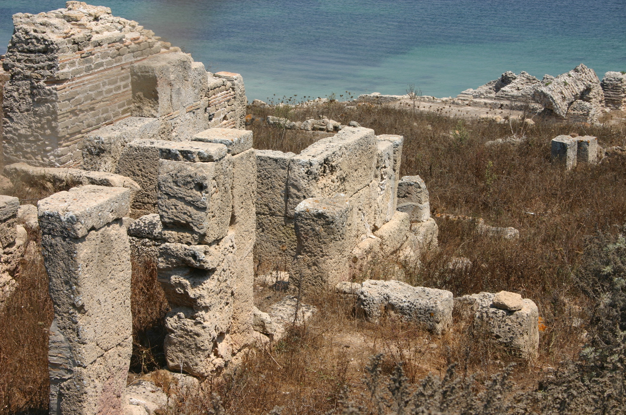 Ruinen der antiken Stadt Tharros auf Sardinien